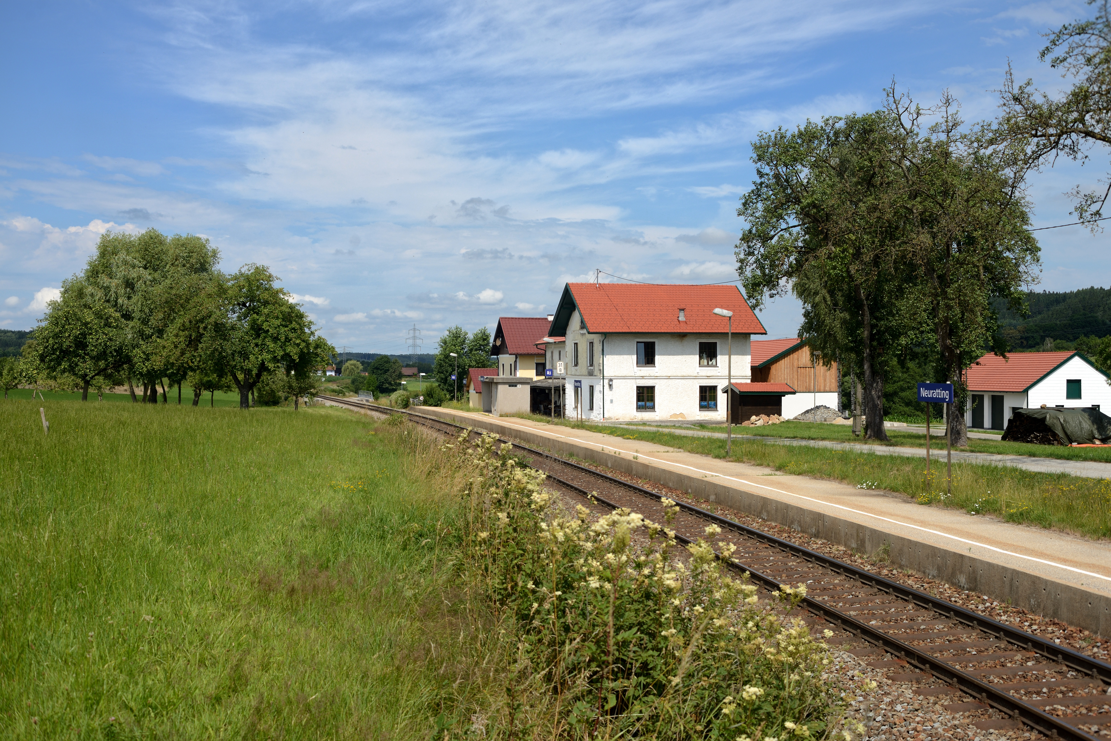 Bahnsteig der Haltestelle Neuratting